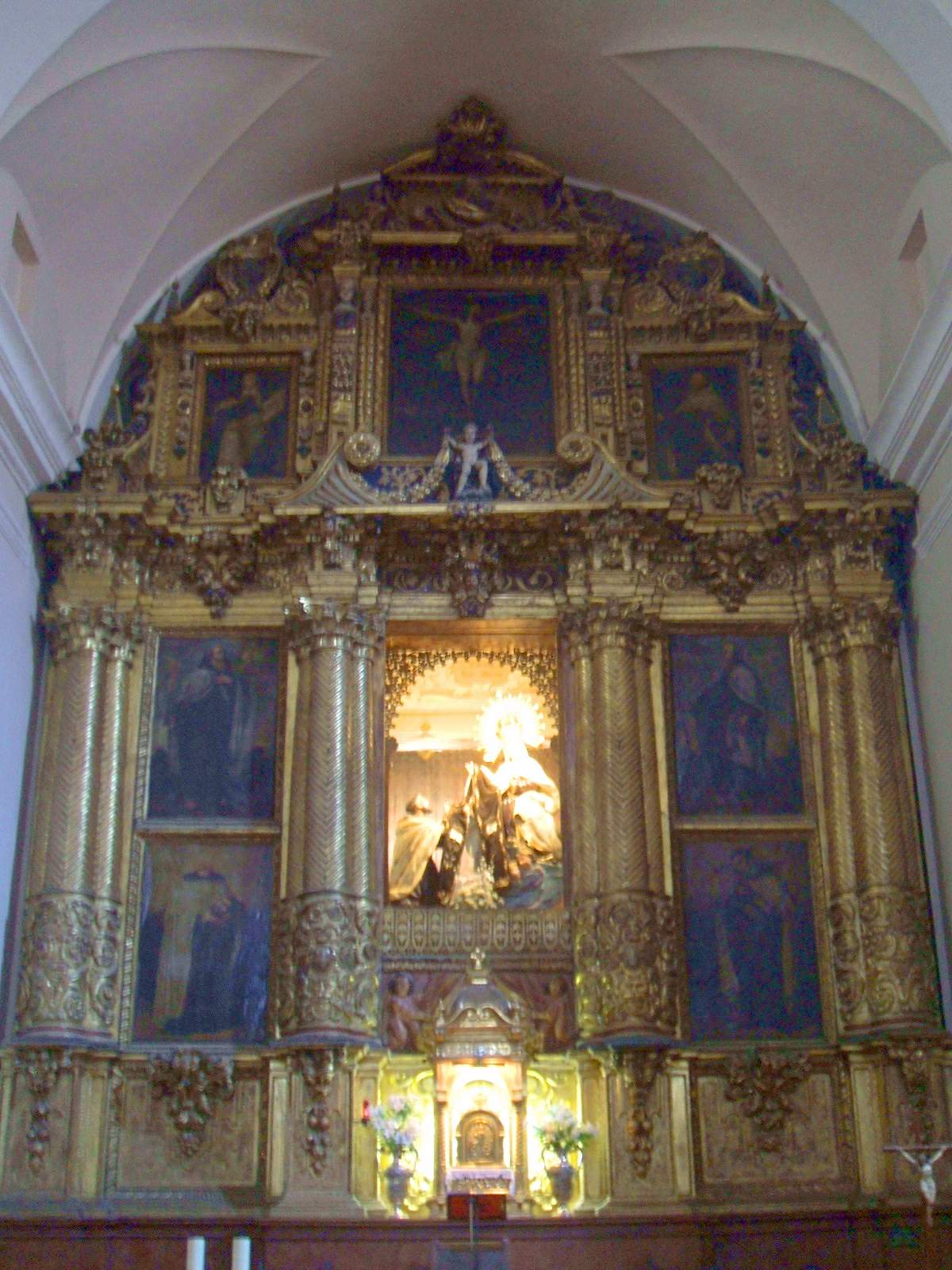 Iglesia del Carmen (Filipenses), en Tudela, Navarra